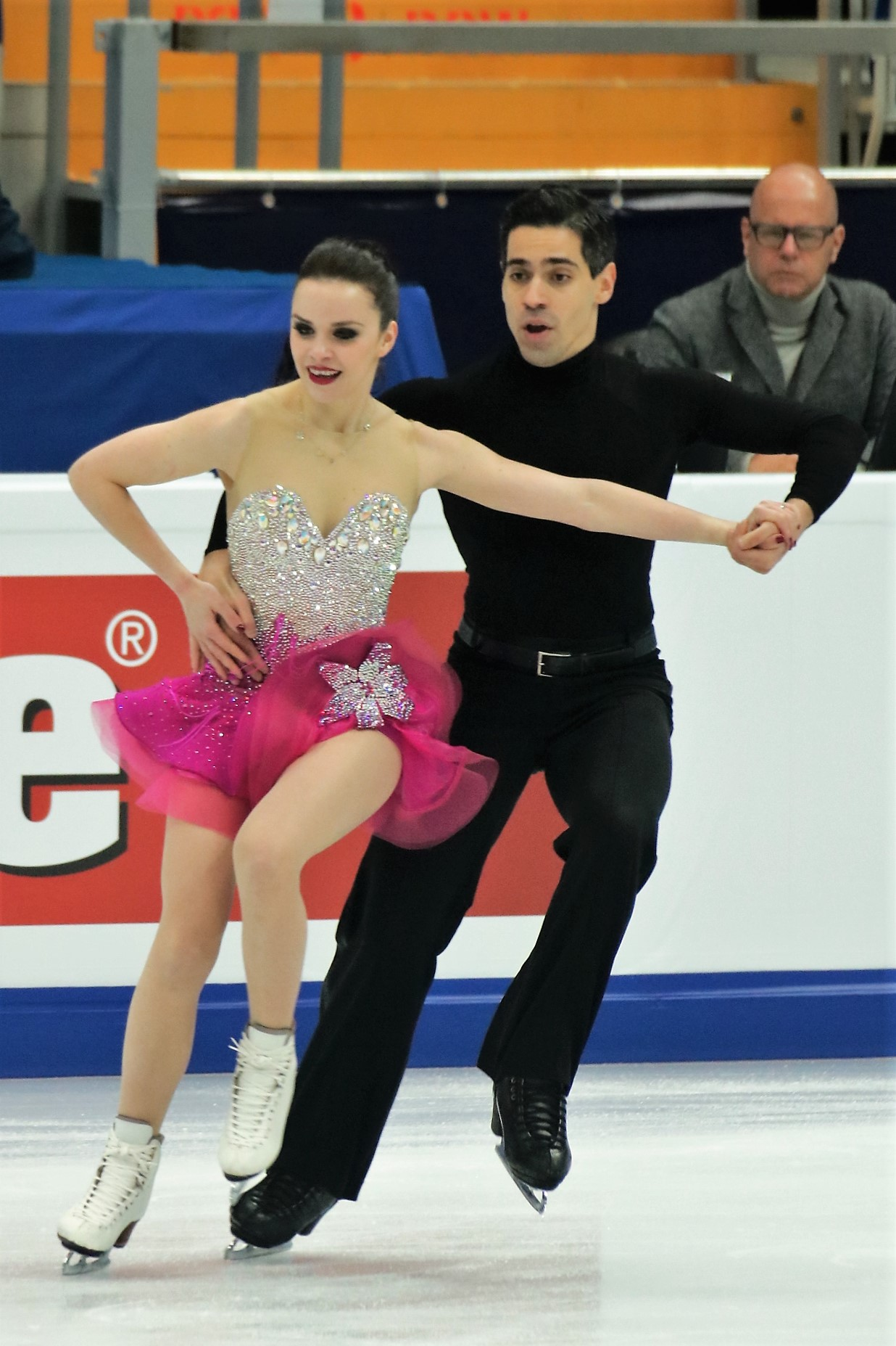 Анна Каппеллини / Лука Ланотте (Италия) на Чемпионате Европы по фигурному катанию 2018.